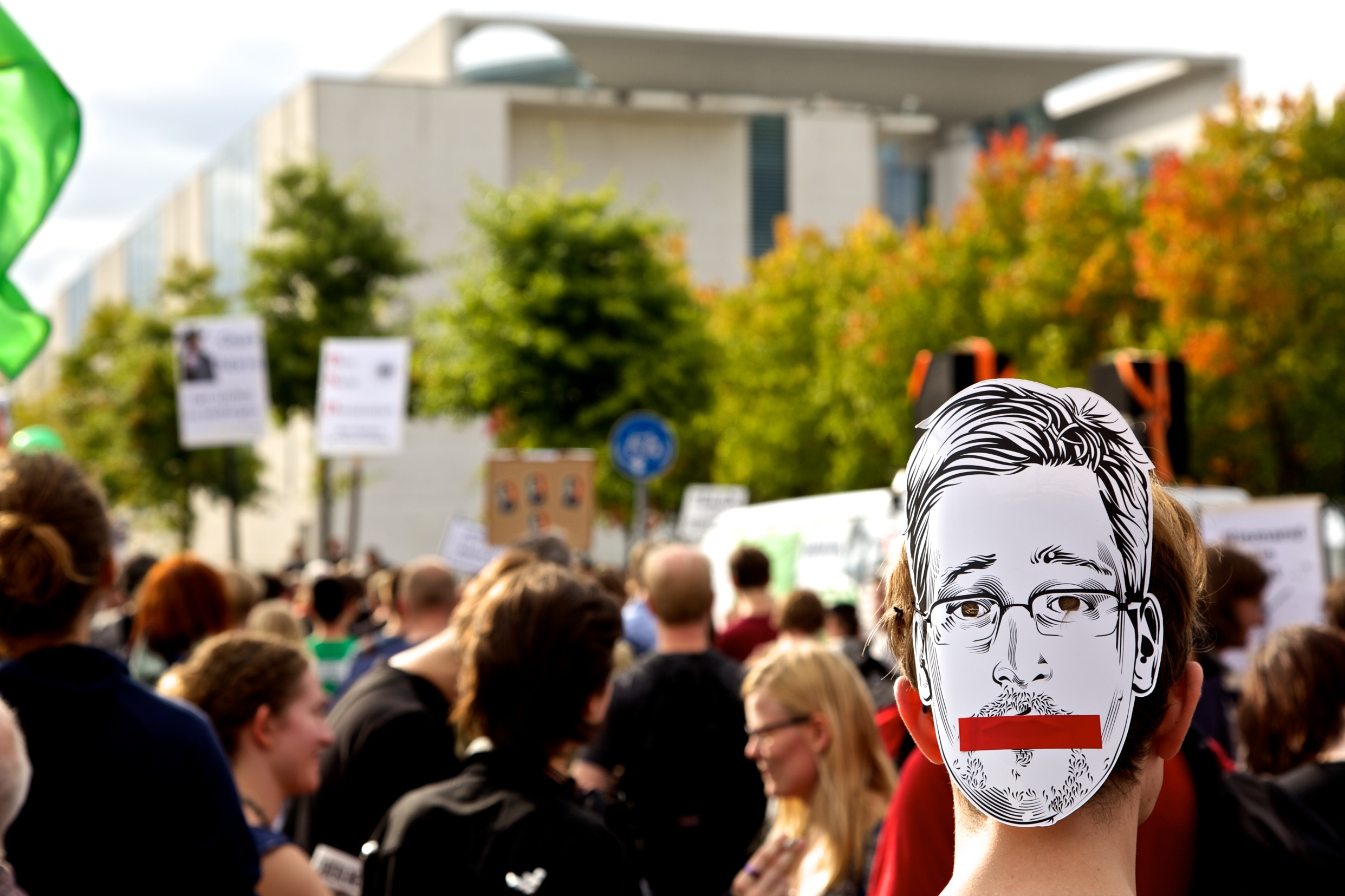 Am 30. August 2014 fand in Berlin die jährliche 'Freiheit statt Angst' Demonstration statt. Protestiert wurde gegen die Totalüberwachung von NSA, GCHQ und BND und für digitale Menschen- und Bürgerrechte sowie für die Freiheit und den Schutz von Whistleblowern. Weitere Infos: freiheitstattangst.de/